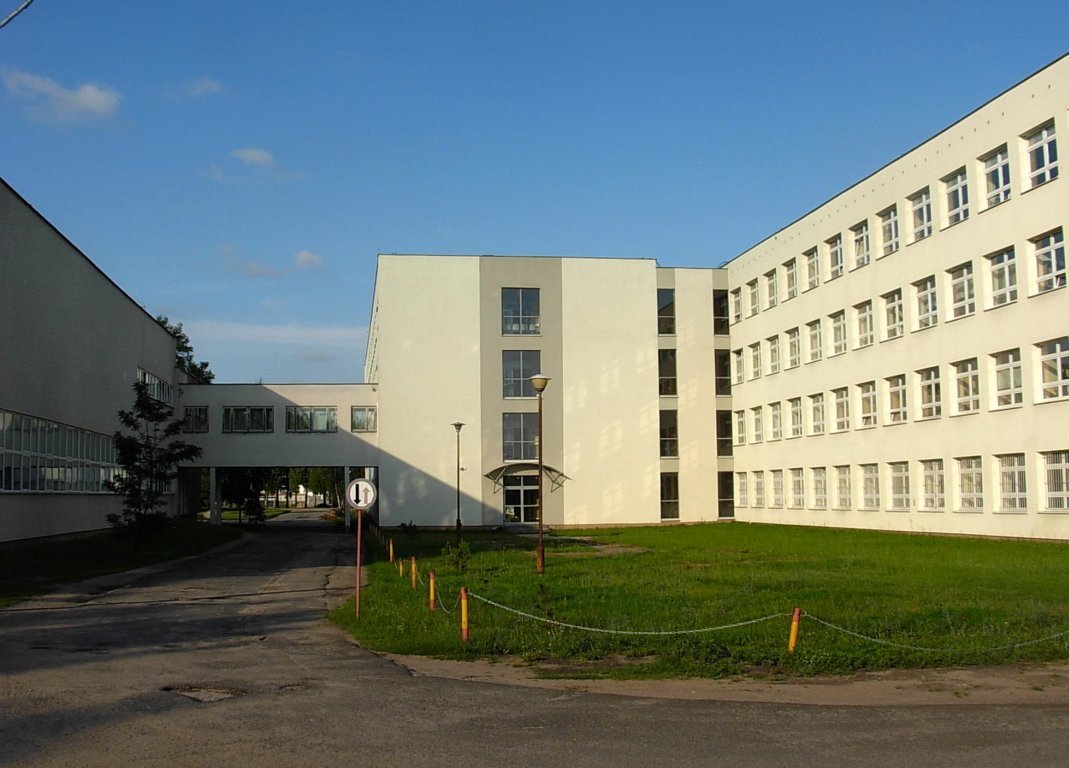 Uniwersytet Technologiczno-Przyrodniczy w Bydgoszczy